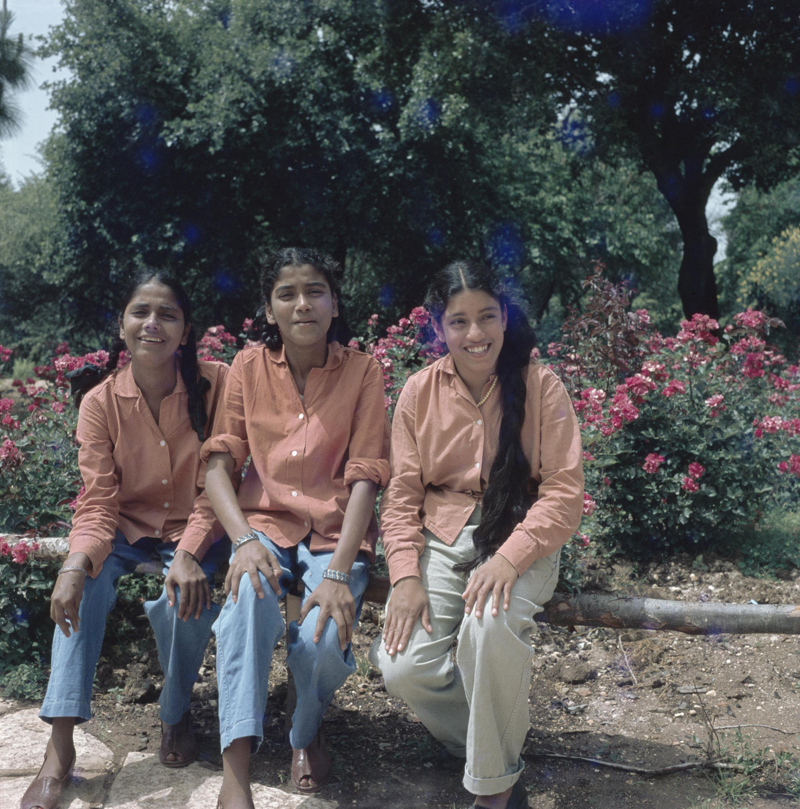 Collectie / Archief : Fotocollectie Van de Poll Reportage / Serie : [ onbekend ] Beschrijving : Uitstapje van jeugd uit een kibboets. Drie joodse meisjes uit India Datum : ongedateerd Locatie : Israël Trefwoorden : kibboetsen, poseren, vrijtijdbesteding, vrouwen Fotograaf : Poll, Willem van de, [onbekend] Auteursrechthebbende : Nationaal Archief Materiaalsoort : Negatief (zwart/wit) Nummer archiefinventaris : bekijk toegang 2.24.14.02 Bestanddeelnummer : 255-9262